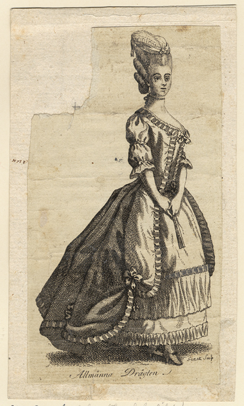 Gustaf III:s nationella dräkt. "Allmänna drägten." Dam i svenska dräkten. Gravyr av Johan Snack (1756-1790), trol. ca 1780.